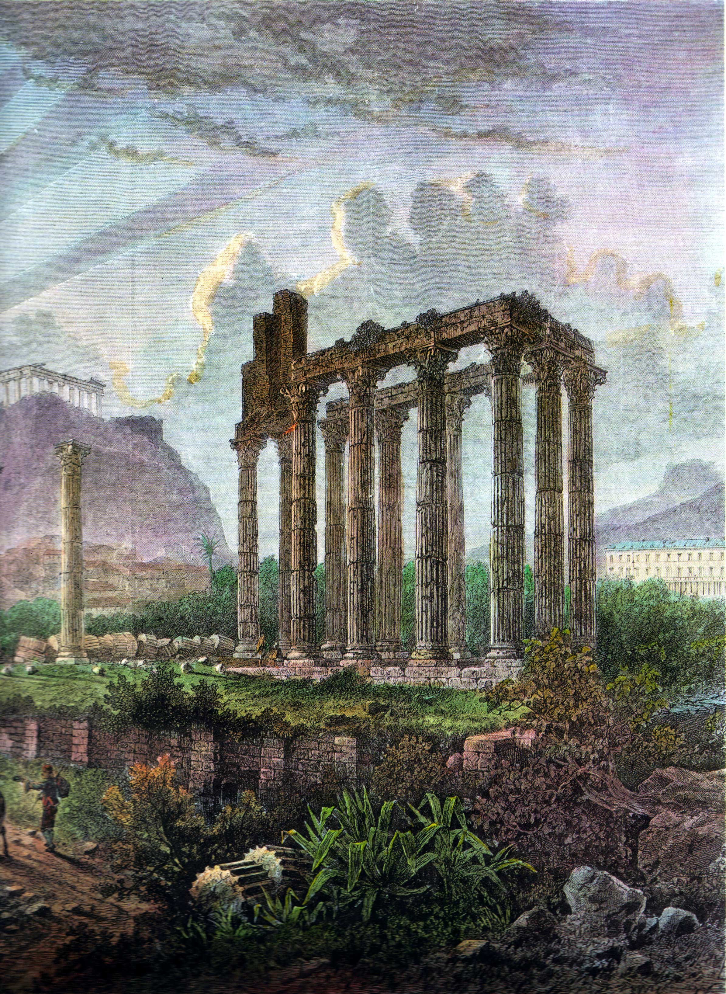 detail